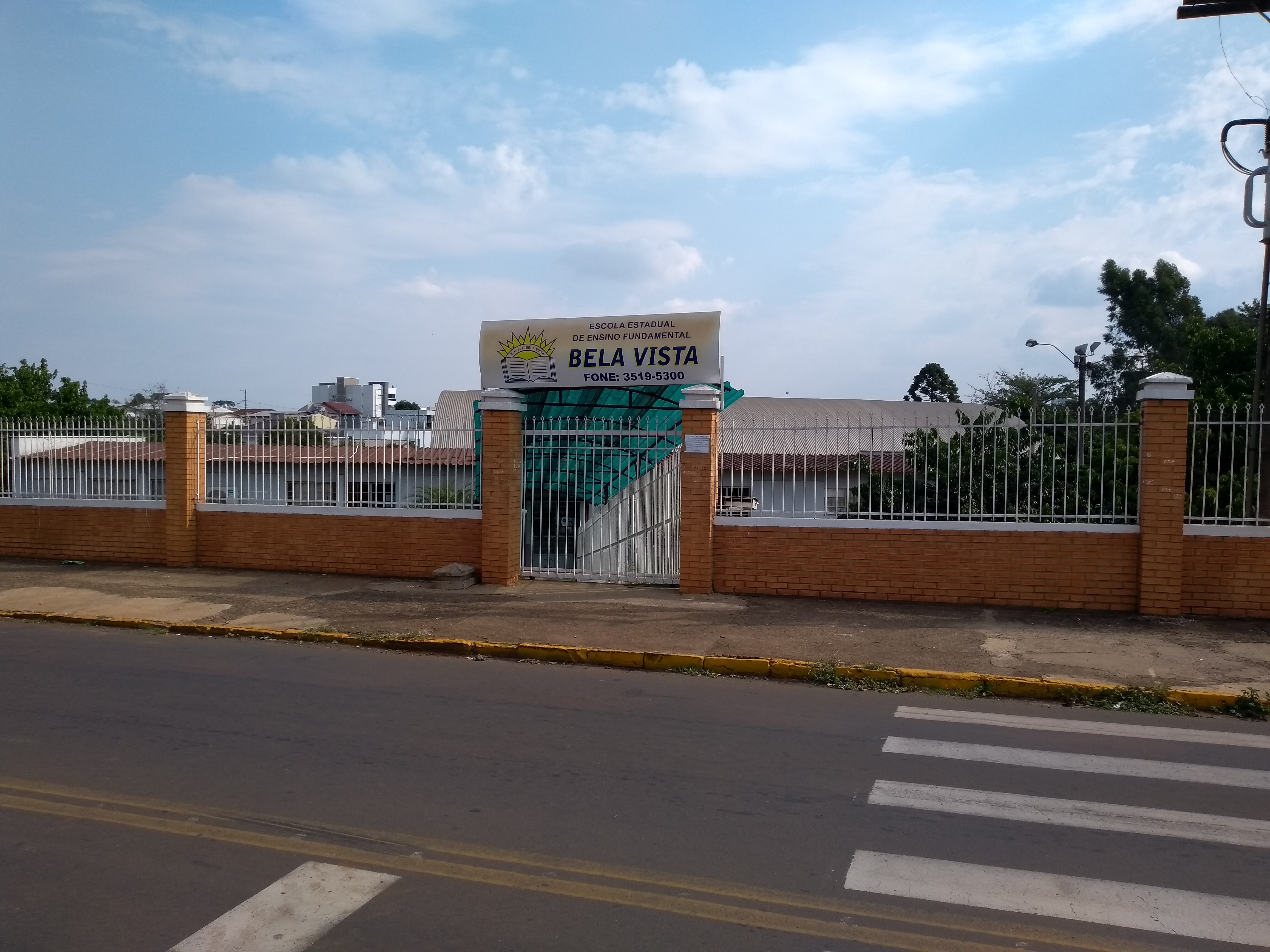 Fachada da Escola Bela Vista, Erechim, Brasil